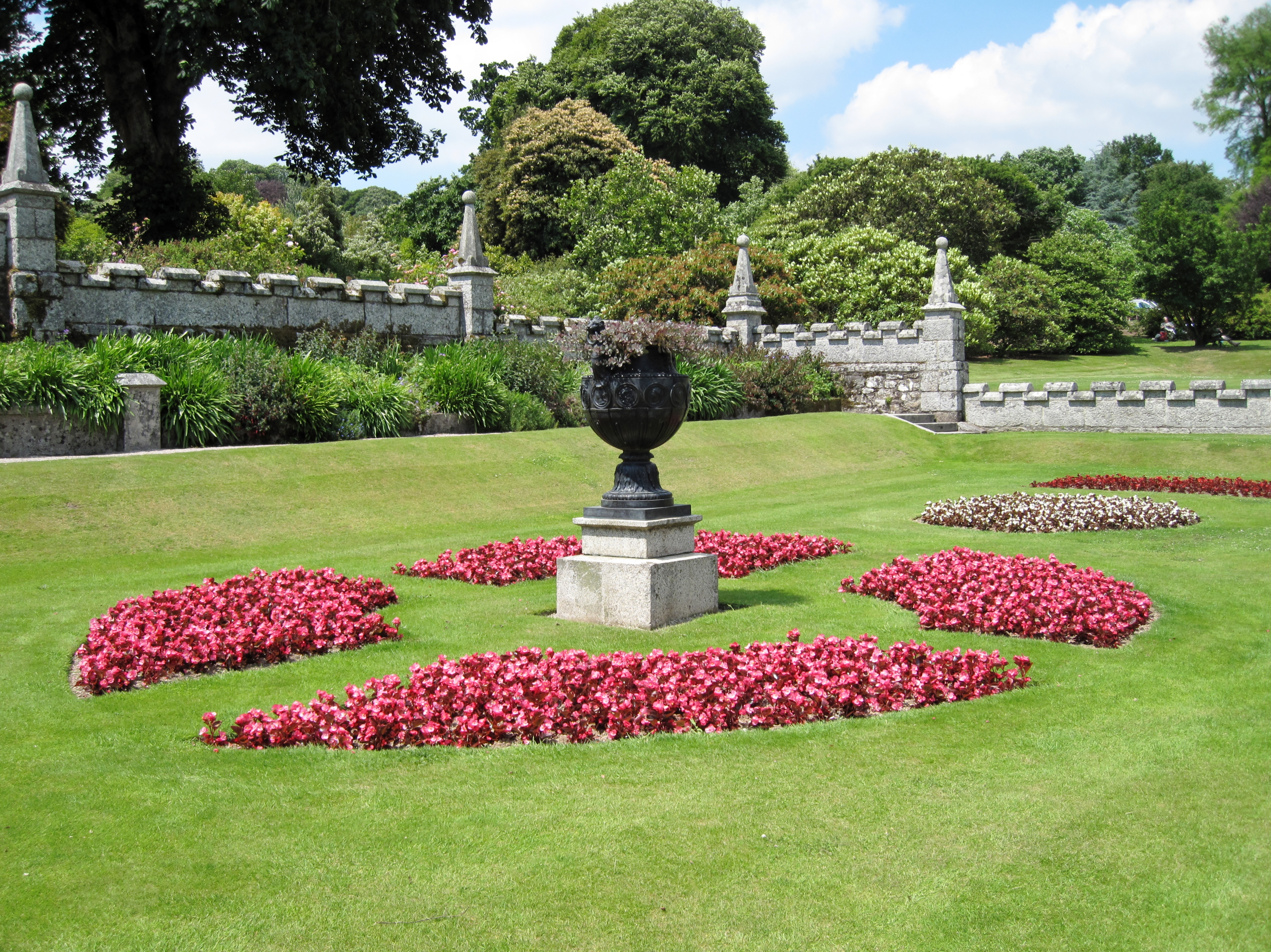 Garten von Lanhydrock, einem Herrenhaus nahe Bodmin in Cornwall, England